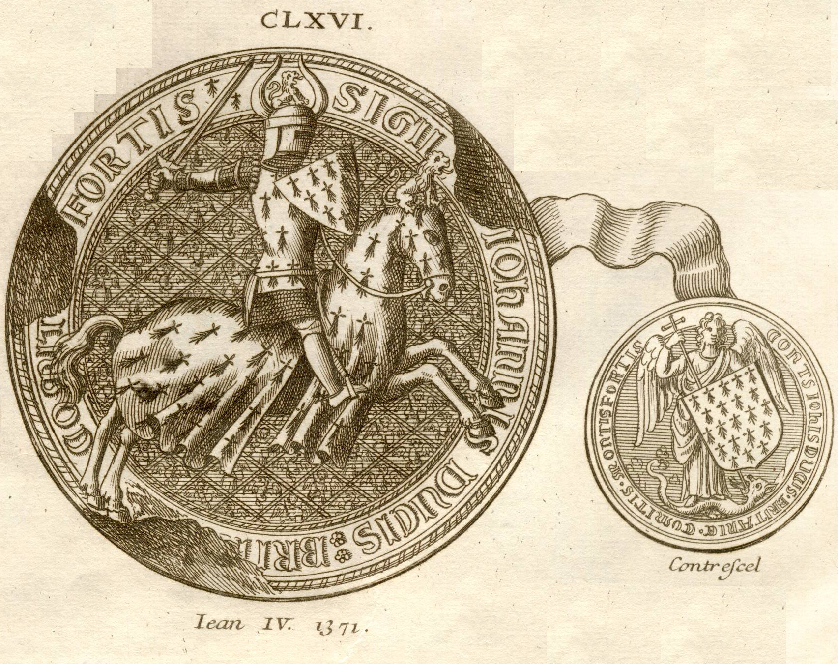 Sceau et contre-sceau de Jean IV